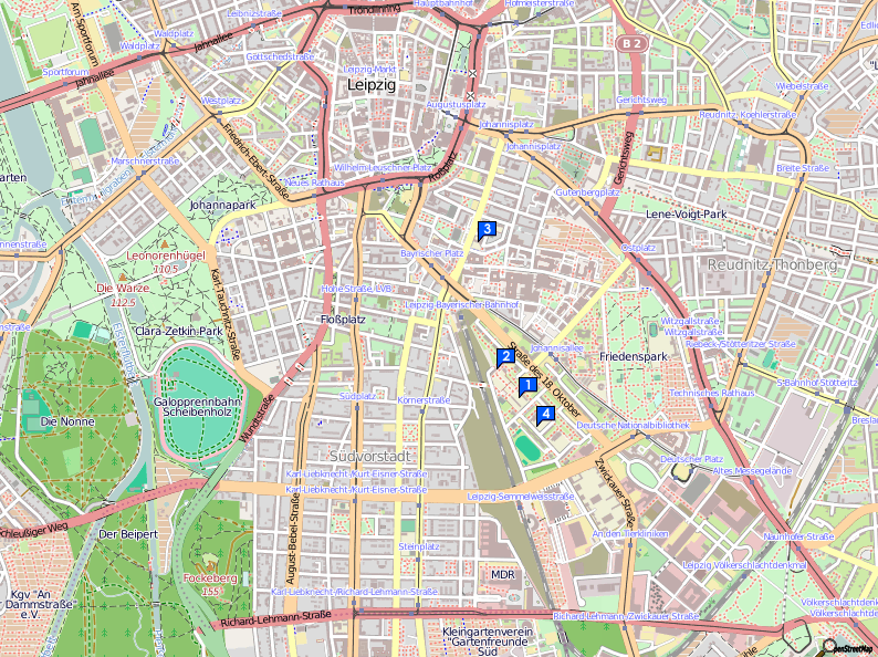 Lage der Einrichtungen des Deutsch-französisches Bildungszentrum Leipzig 1 - Anton-Philipp-Reclam-Schule, Gymnasium der Stadt Leipzig 2 - Pablo-Neruda-Schule, Grundschule und Hort 3 - Georg-Schumann-Schule, Mittelschule der Stadt Leipzig 4 - Deutsch-Französische Integrative Kindertageseinrichtung Leipzig, Tarostraße 9 This map of Leipzig was created from OpenStreetMap project data, collected by the community. This map may be incomplete, and may contain errors. Don't rely solely on it for navigation.